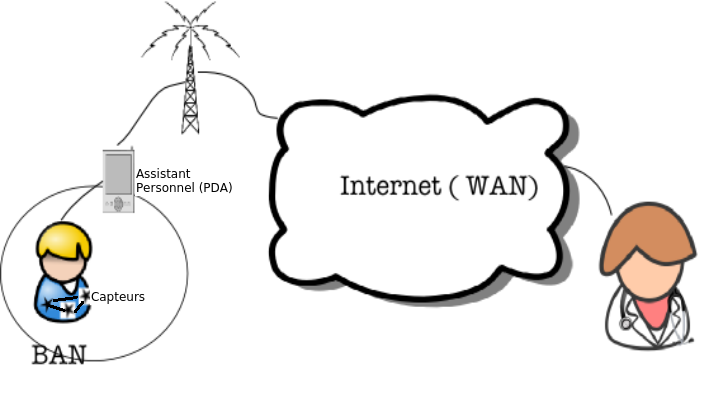 Interconnexion BAN WAN